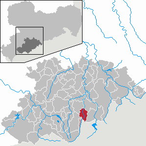 Königswalde im Erzgebirgskreis, Sachsen